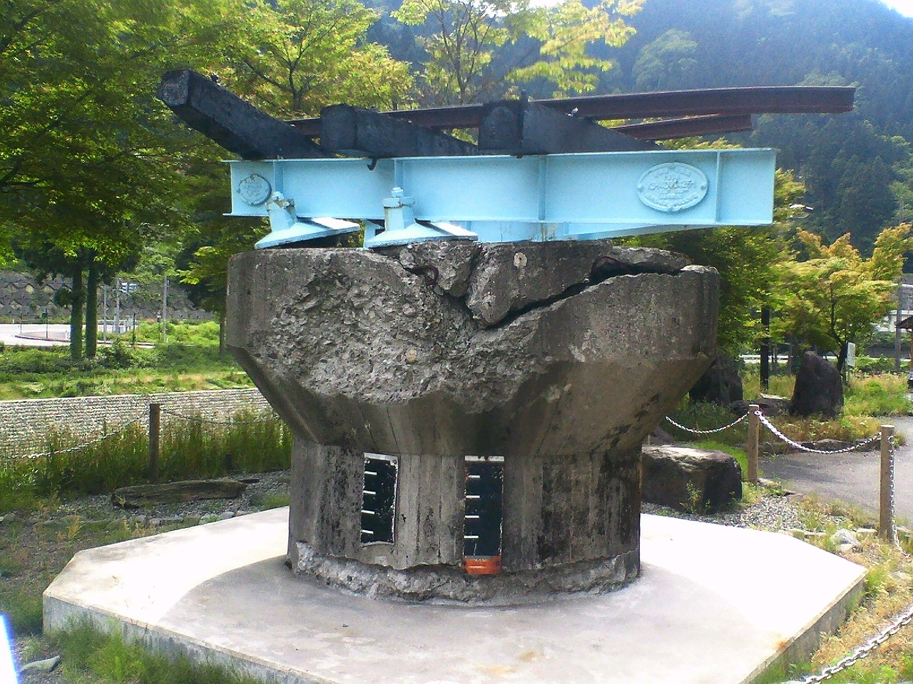 崩壊した越美北線第七足羽川橋梁を基に作られたモニュメント「福井豪雨の記憶」。2007年6月3日、福井県福井市獺ケ口町にてSuper Hatsukari撮影。